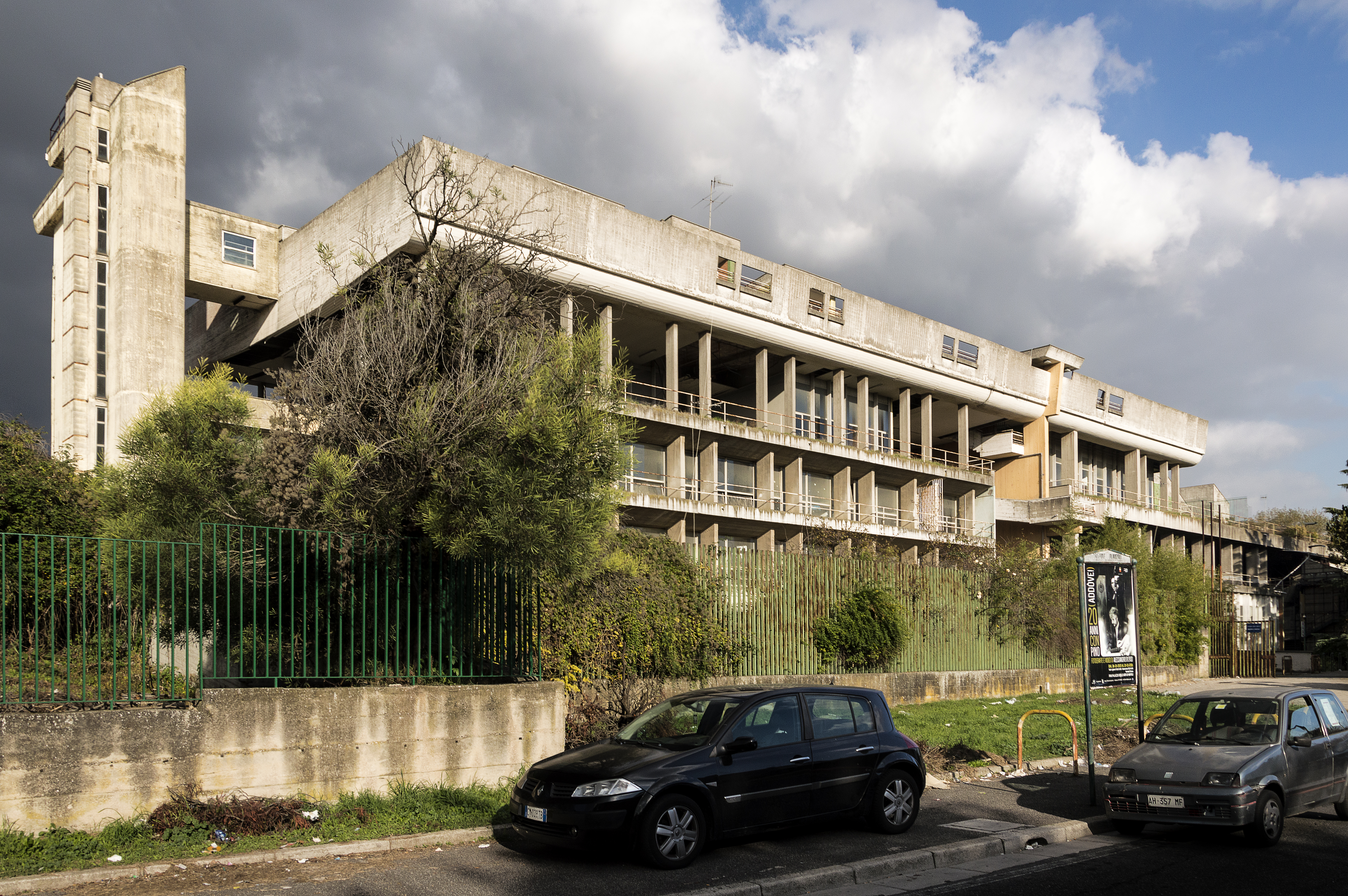 Complesso scolastico a Marianella (Napoli), Gerardo Mazziotti (1970/1980)